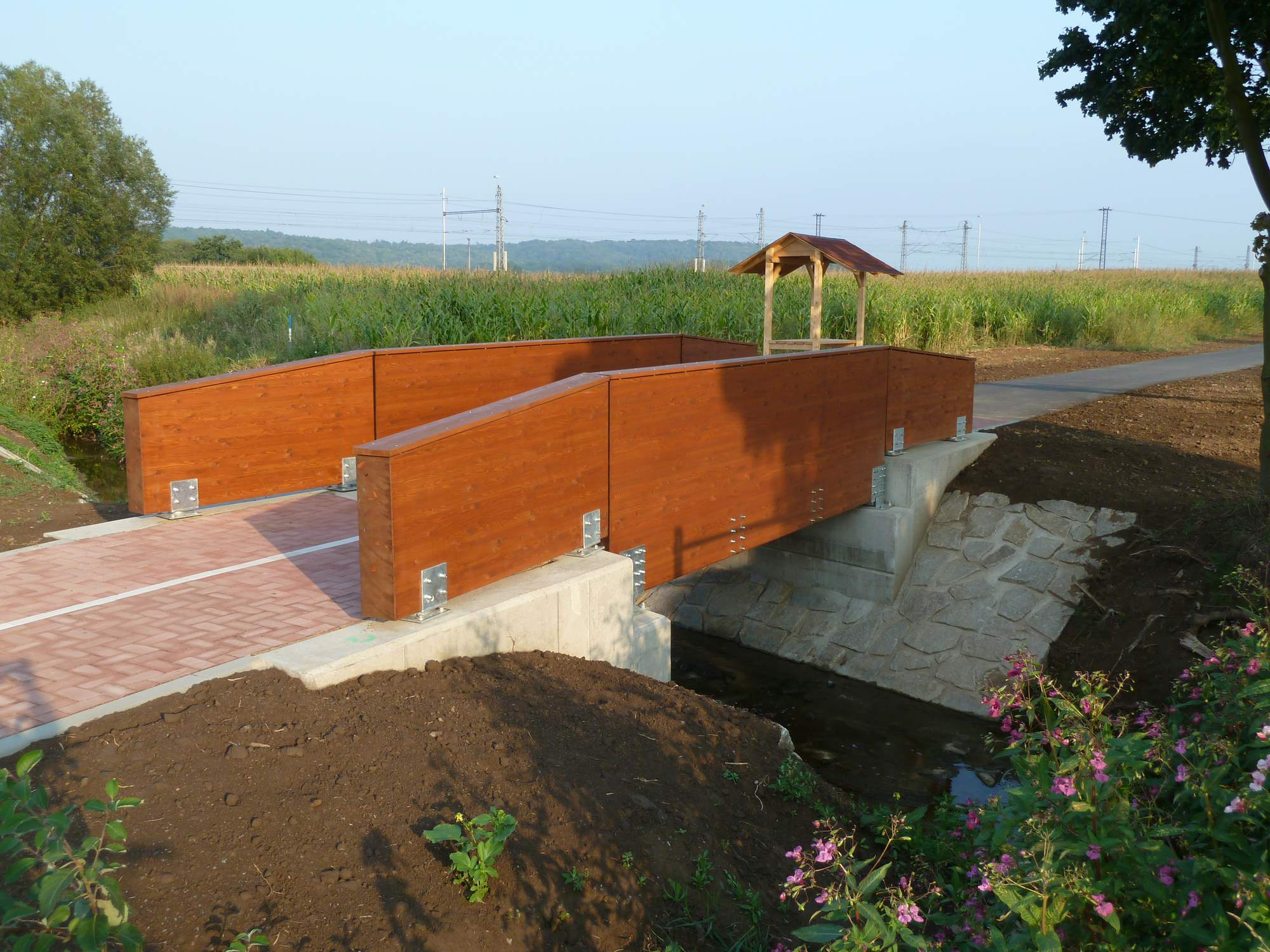 Cyklostezka do Moravičan